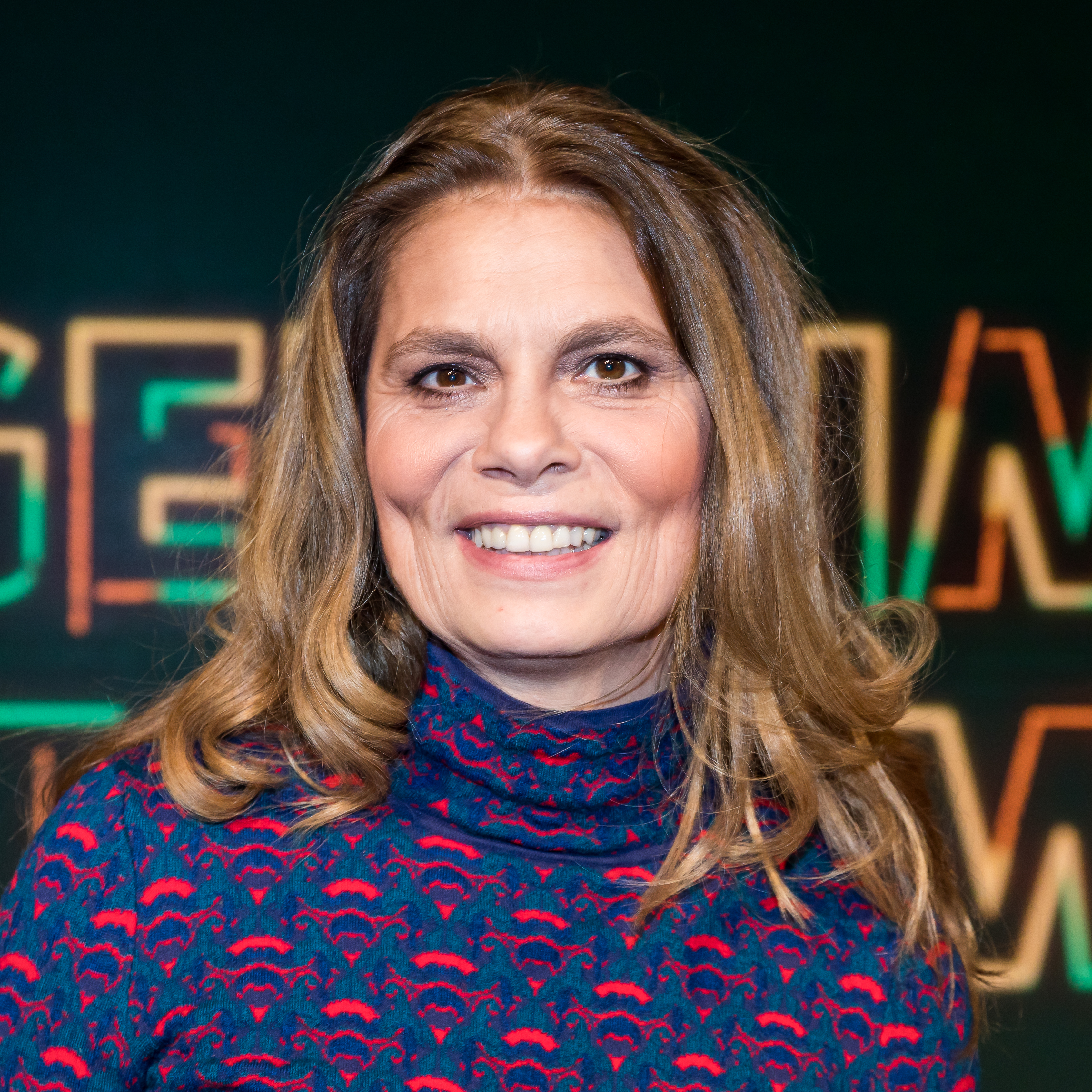 „Geheimniskrämer“ mit Martin Klempnow und seinen Gästen. Aufzeichnung des Westdeutschen Rundfunks im Studio Köln-Bocklemünd vom 26. Januar 2018 Foto: Sarah Wiener